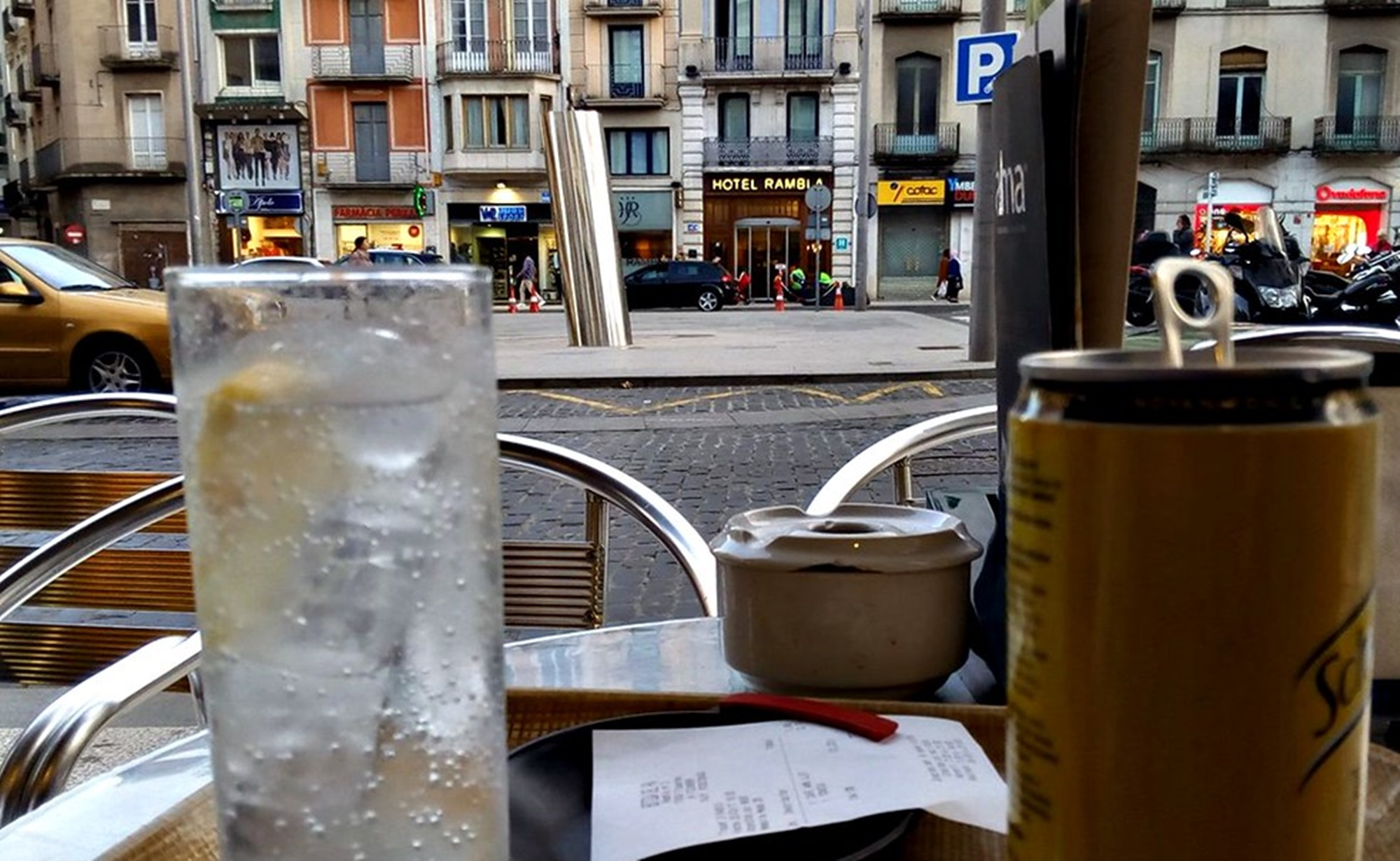 Lloc ideal pels turistes